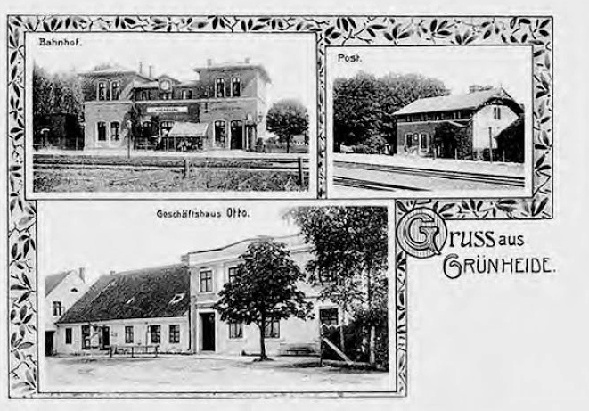 Grünheide, Kreis Insterburg, Ostpreußen um 1905: Bahnhof, Postamt, Geschäftshaus Otto